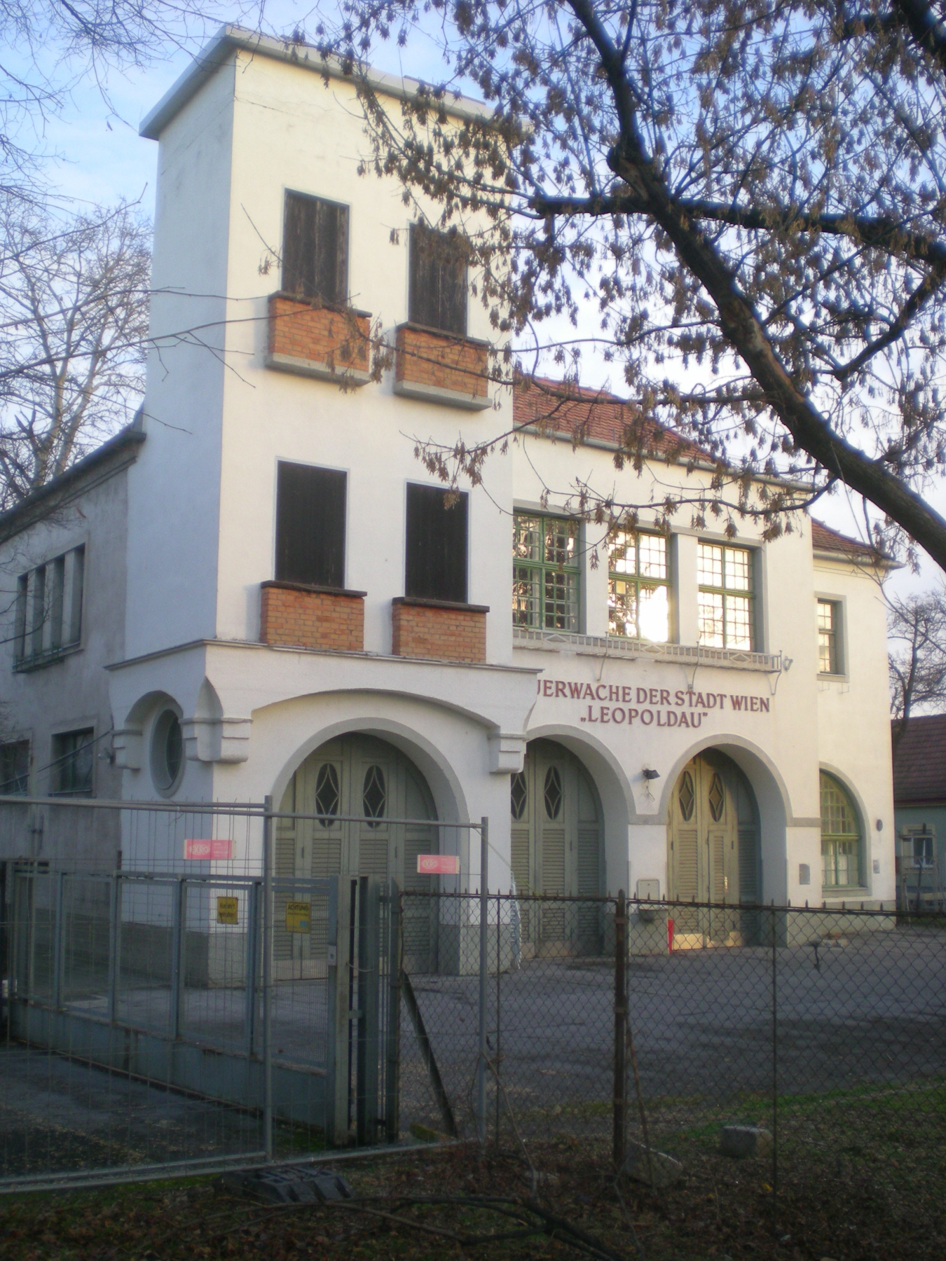 Feuerwache Leopoldau der Wiener Feuerwehr